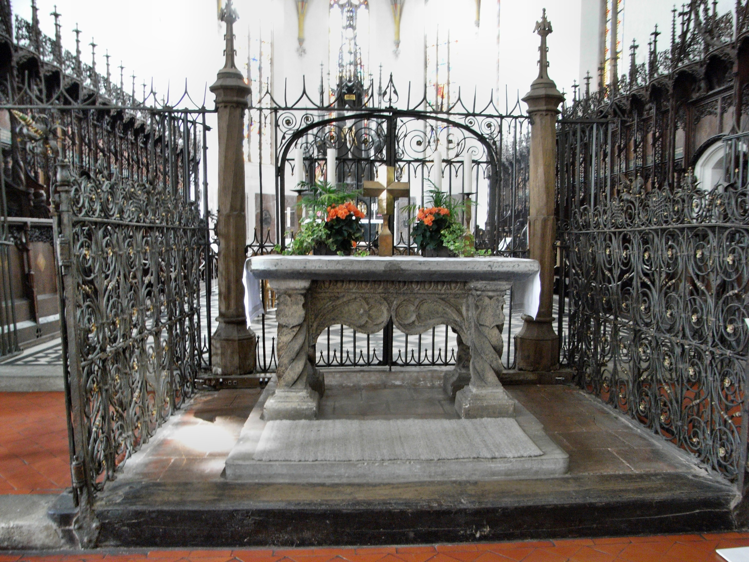 Der Kreuzaltar von 1531 mit der kunstvoll geschmiedeten Umrahmung